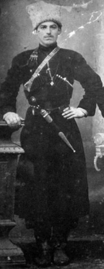 Грицько Сідельник - повстанський отаман на Кубані